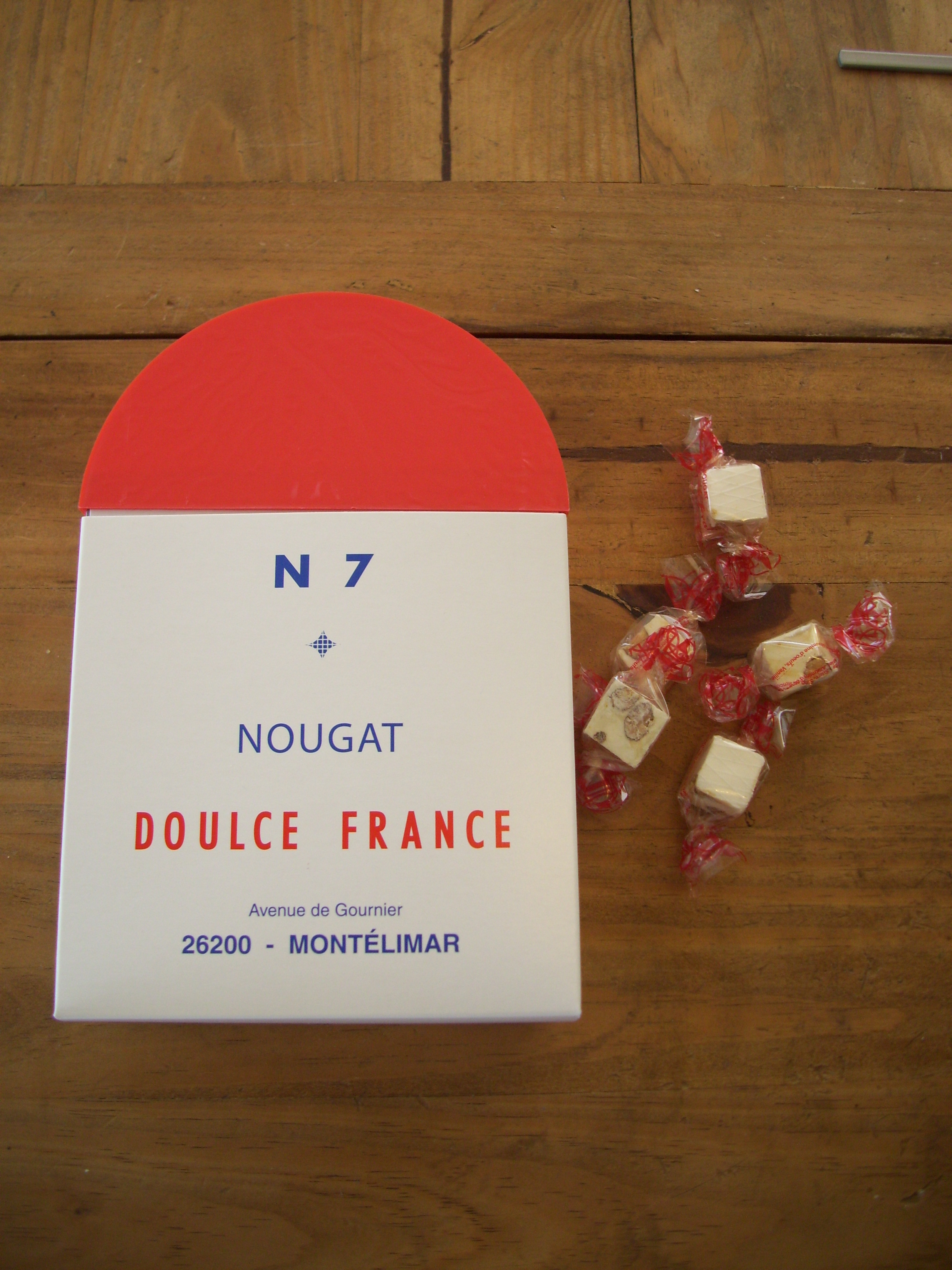 Emballage de nougat de Montélimar en forme de borne